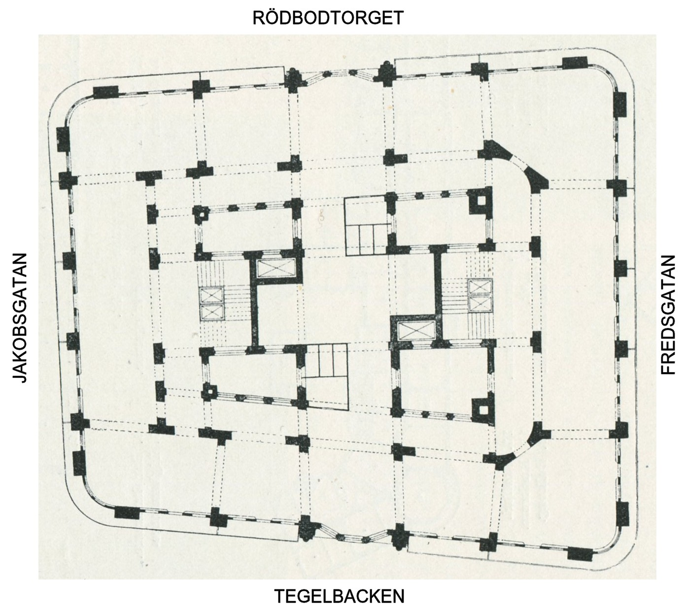 Planritning för Centralpalatset i Stockholm